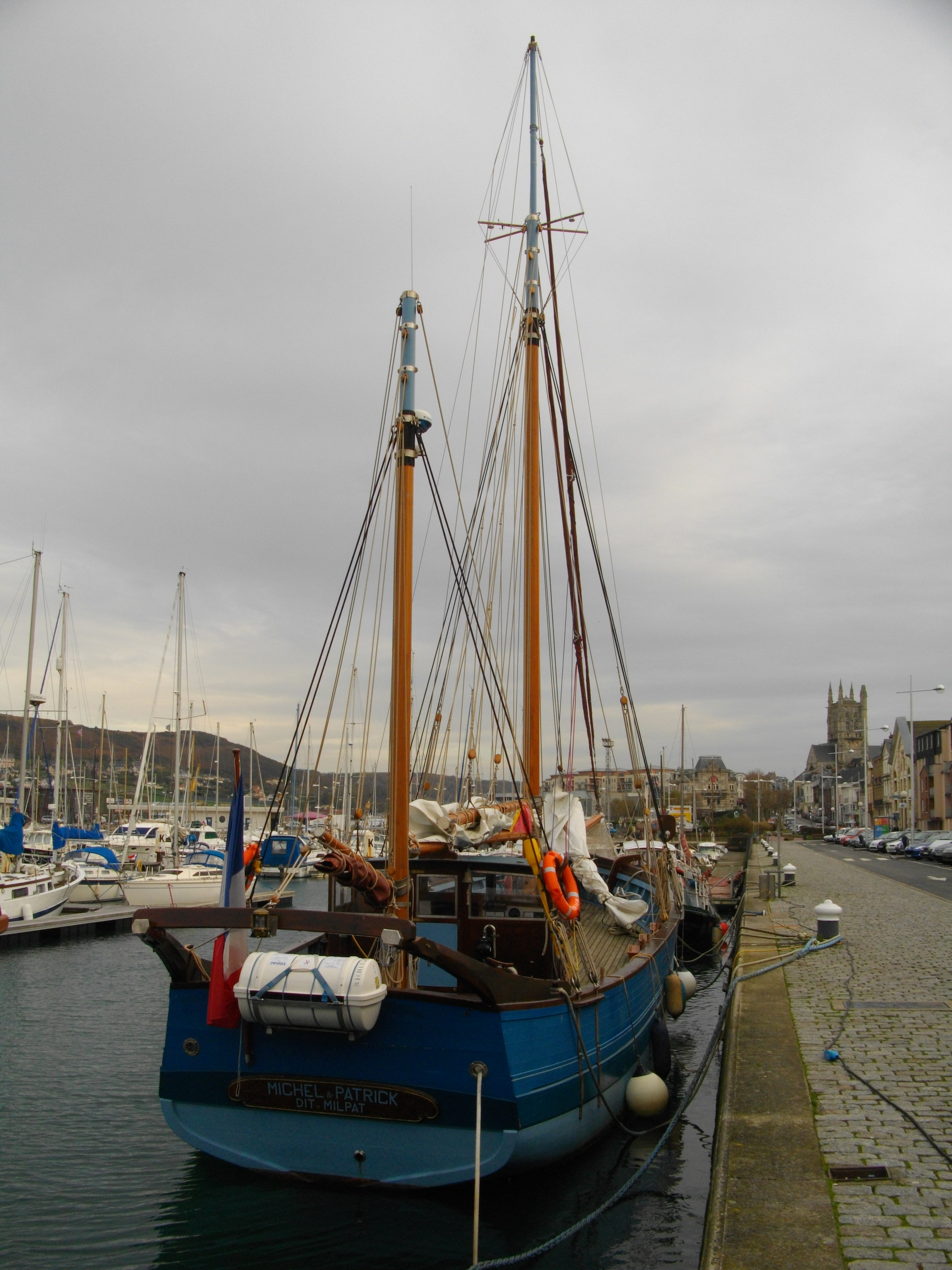 Le Michel & Patrick ancien thonier du Guilvinec. Ce rare malamok est devenu bateau de plaisance, après restauration, à Fécamp.